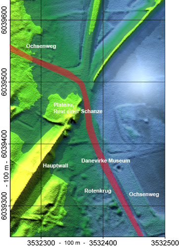 3d-Kartierung des Restplateaus der Danewerk-Schanze von 1658/60; Arbeit erstellt in 3ds-MAX, eigene Lizenz